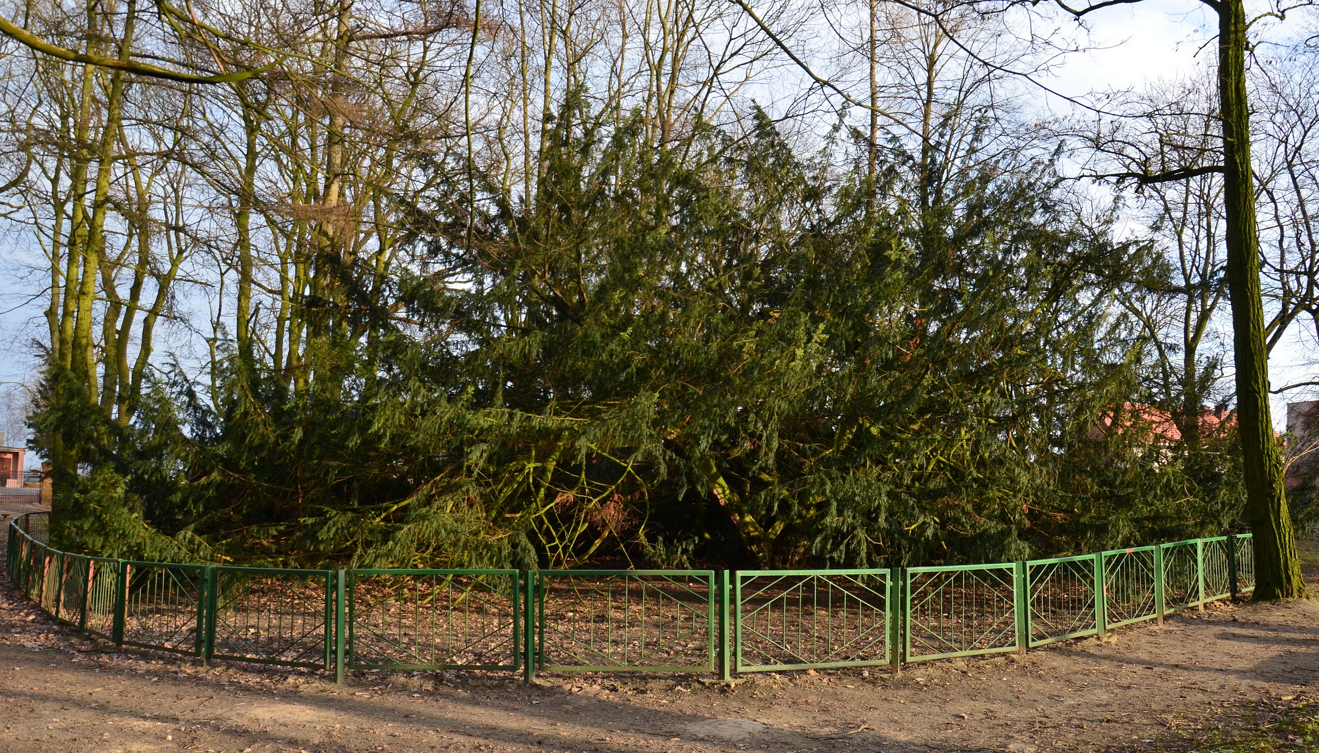 Ryńsk, cis pospolity liczący ok. 500 lat, o obwodzie 106 cm i wysokości 7,5 m. Według legendy cis został zasadzony w roku 1397 przez ówczesnego właściciela miejscowości - Mikołaja z Ryńska na pamiątkę założenia Towarzystwa Jaszczurczego. Od 1960 r. pomnik przyrody.